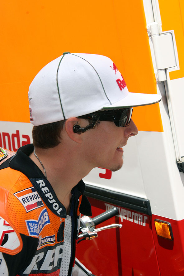 Go kentucky kid, go. Pero Pedrosa te va a ganar el campeonato, que lo sepas